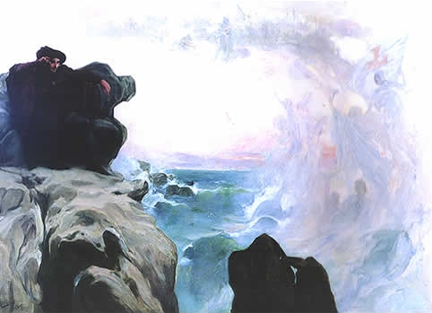 Dimensões: Alt. 1240 X 1715 mm Larg. Óleo sobre tela. Representa Dom Henrique sentado no desvão de um cachopo, no Promontório de Sagres. Contempla o espadanar das ondas nos rochedos, como se estivesse a estudar o regime dos ventos e os mistérios do mar.